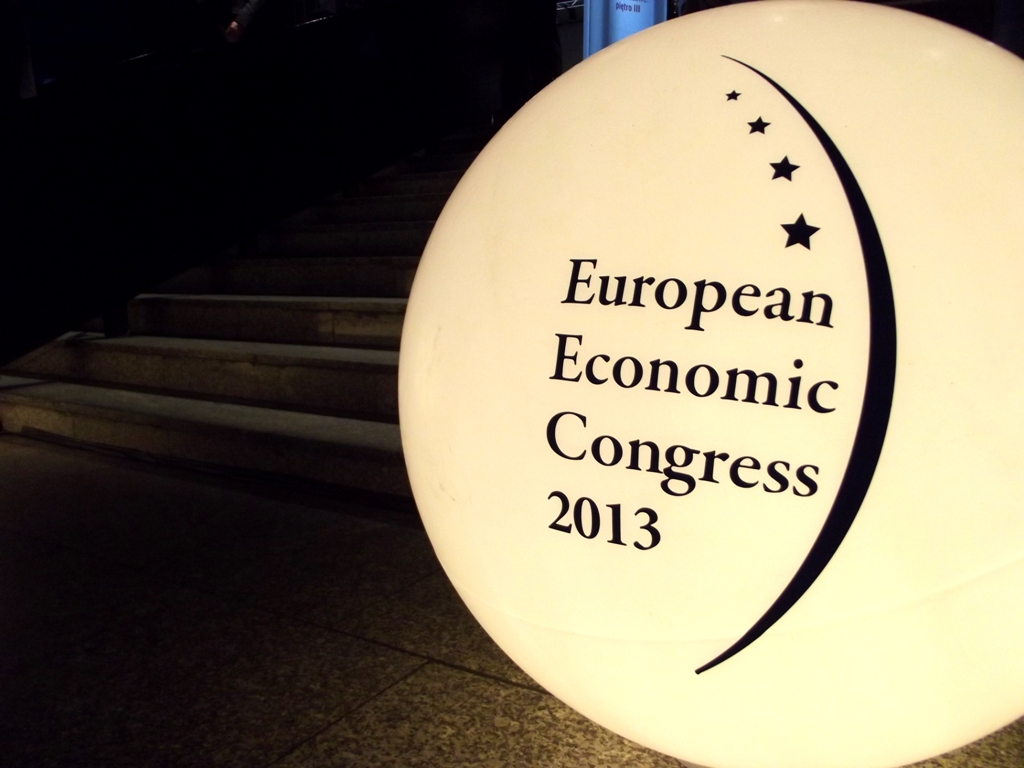 Zdjęcie zrobione podczas V Europejskiego Kongresu Gospodarczego (EEC) w Katowicach.